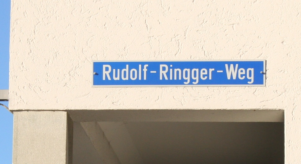 Rinnger-Weg in Küsnacht ZH in Erinnerung an Rudolf Ringger